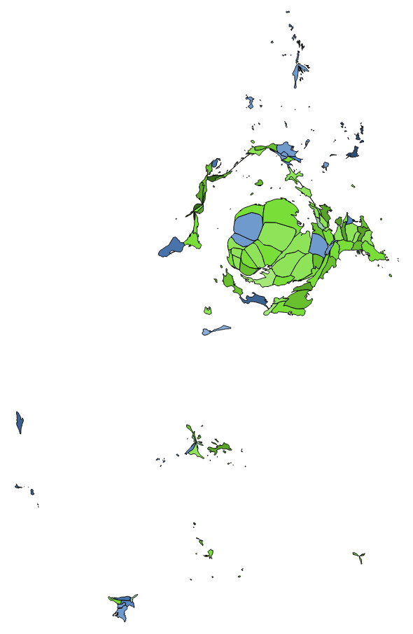 中文（台灣）: 顏色對照表